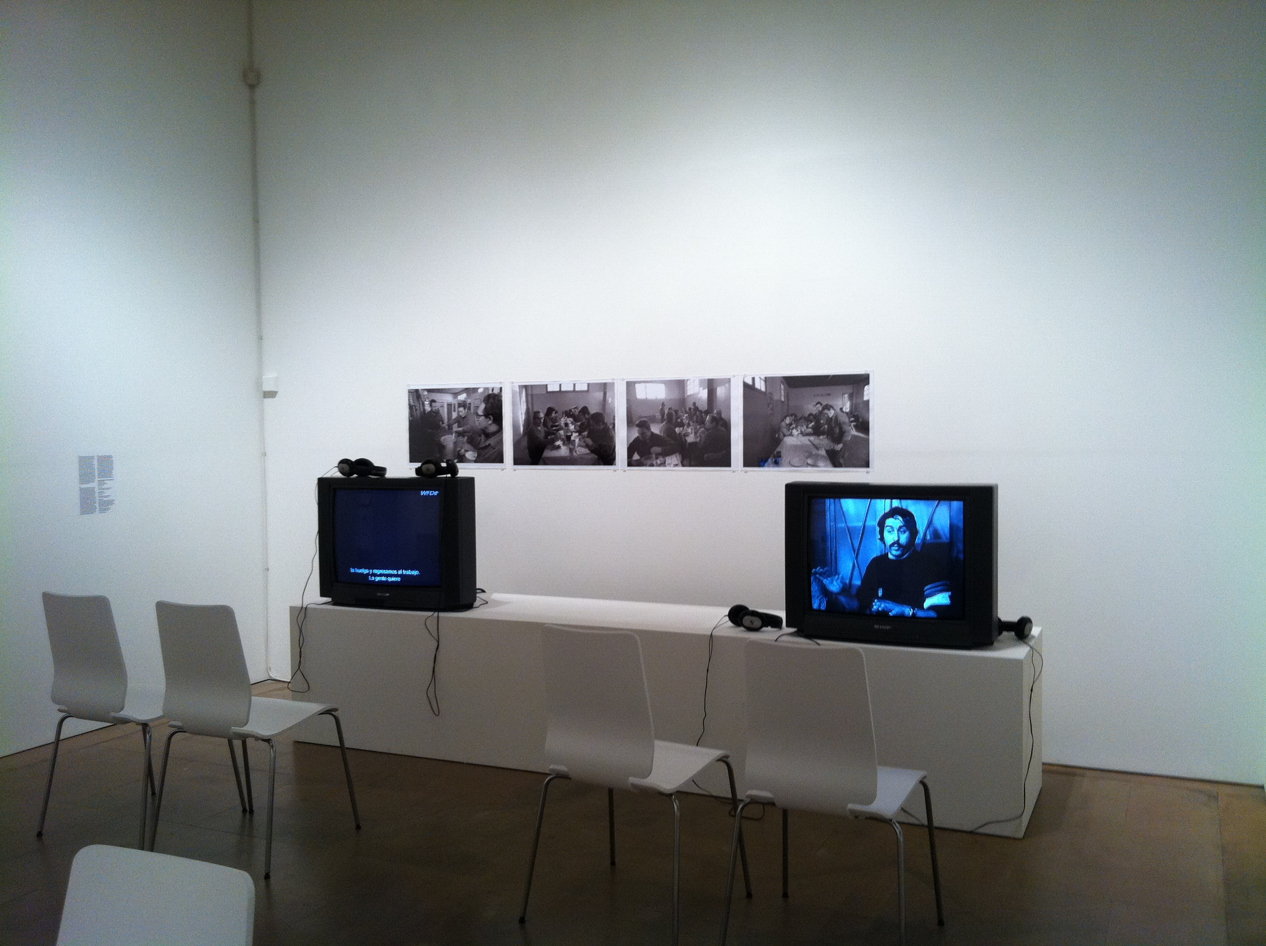 Palau de la Virreina Palau de la Virreina- Sala d'Exposicions